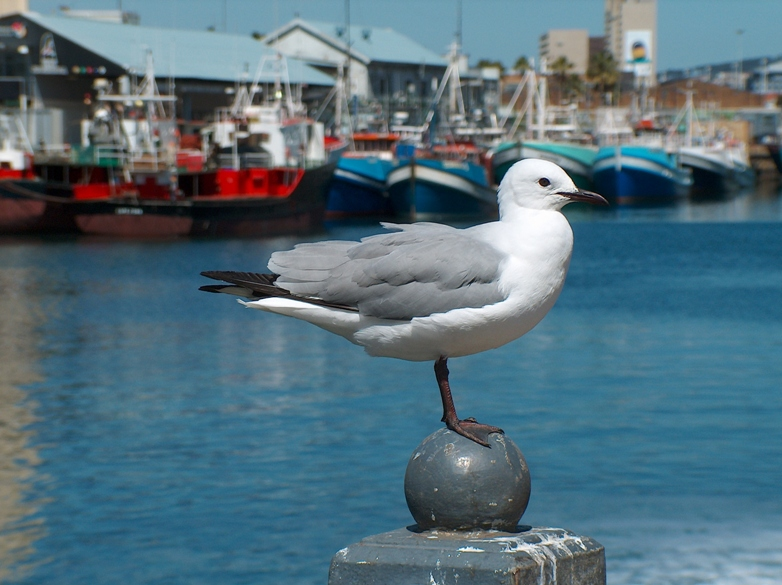 gulls